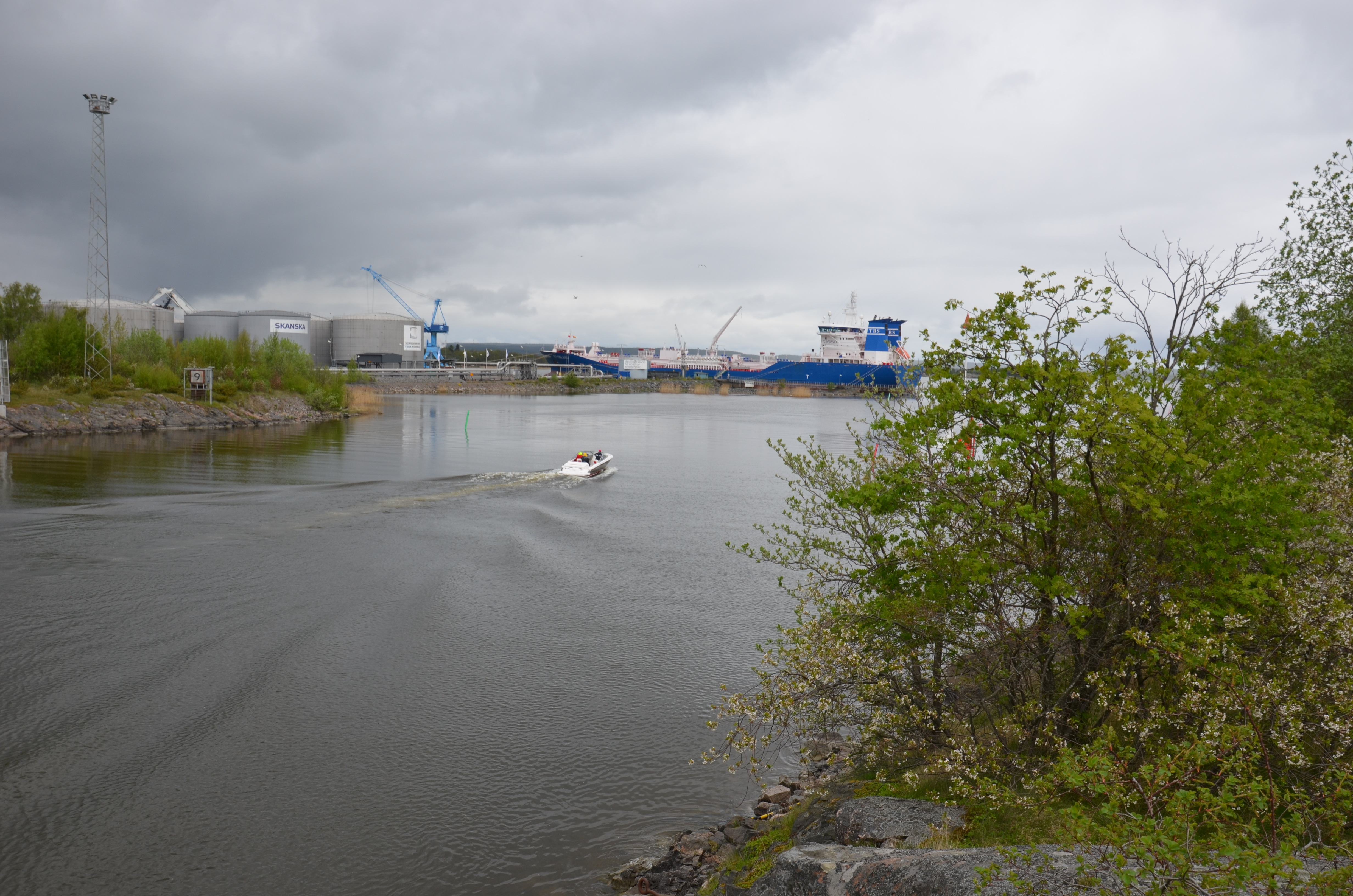 Lindökanalen in Norrköping, eastern end of channel. Photo taken on Lindö.